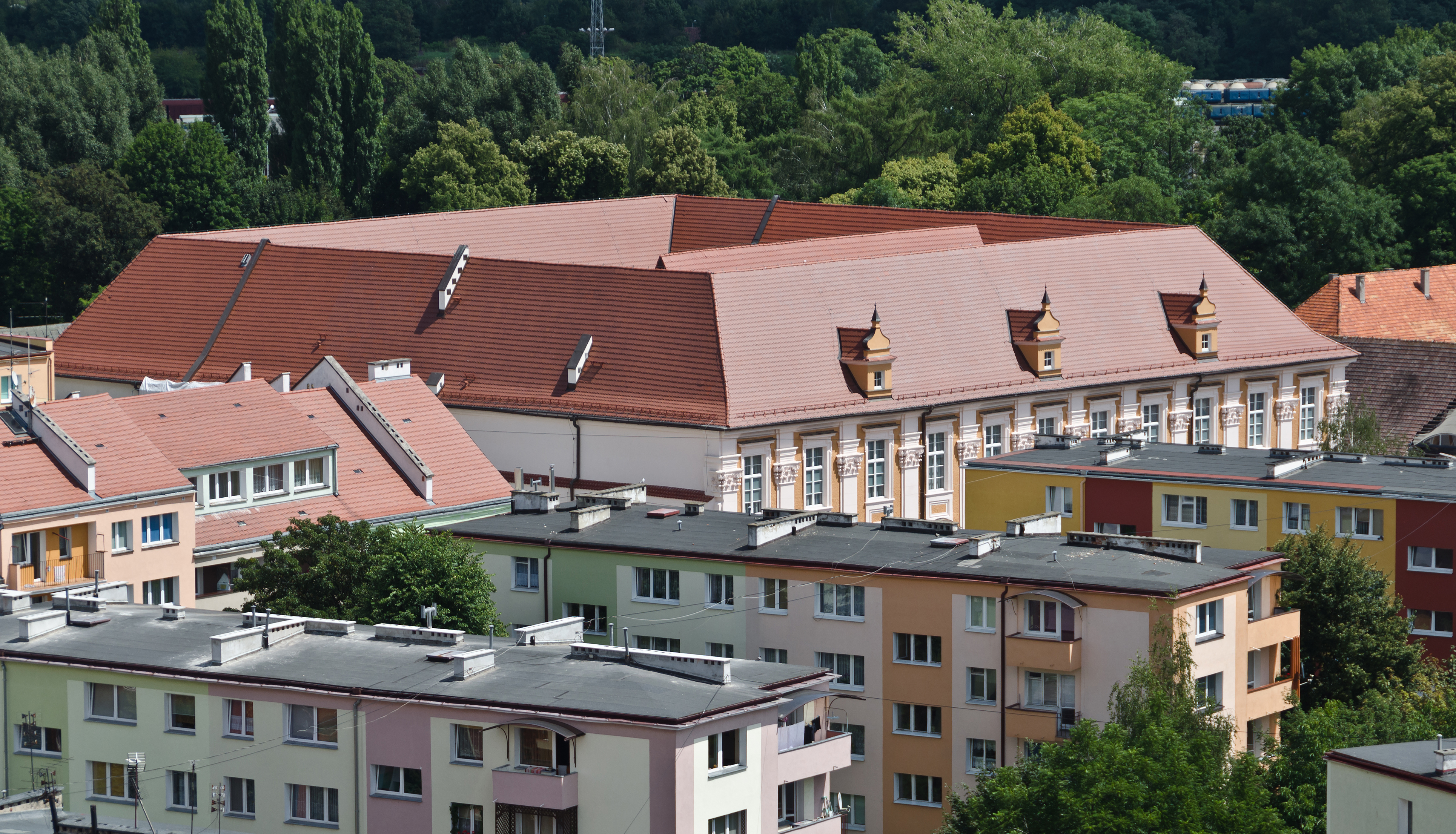 Nysa, pałac biskupi, ob. Muzeum Miejskie, 1608-1627, 1729, 1962